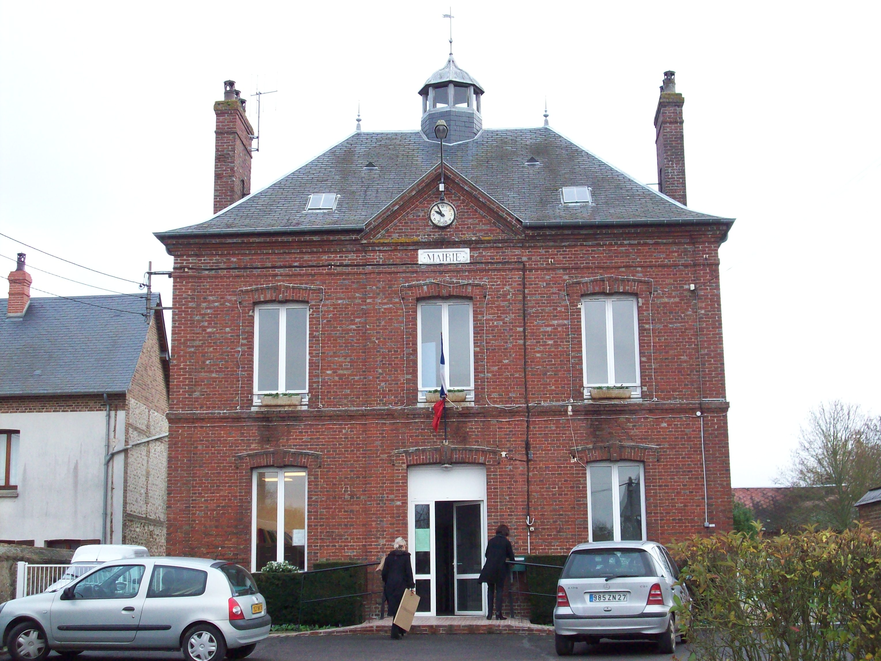 Mairie d'Amfreville-sous-les-Monts, située dans le lieu-dit du Plessis, sur le plateau.